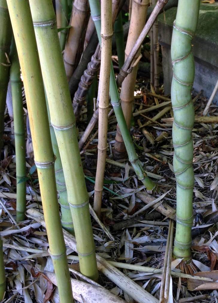 Empilement de noeuds caractéristique du Phyllostachys aurea